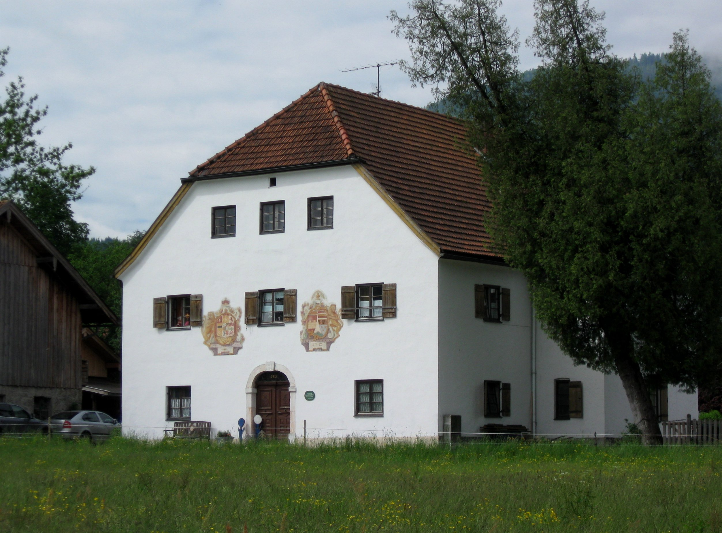 Rosenheimer Straße 108; Mauthaus, mit Halbwalmdach, 1749